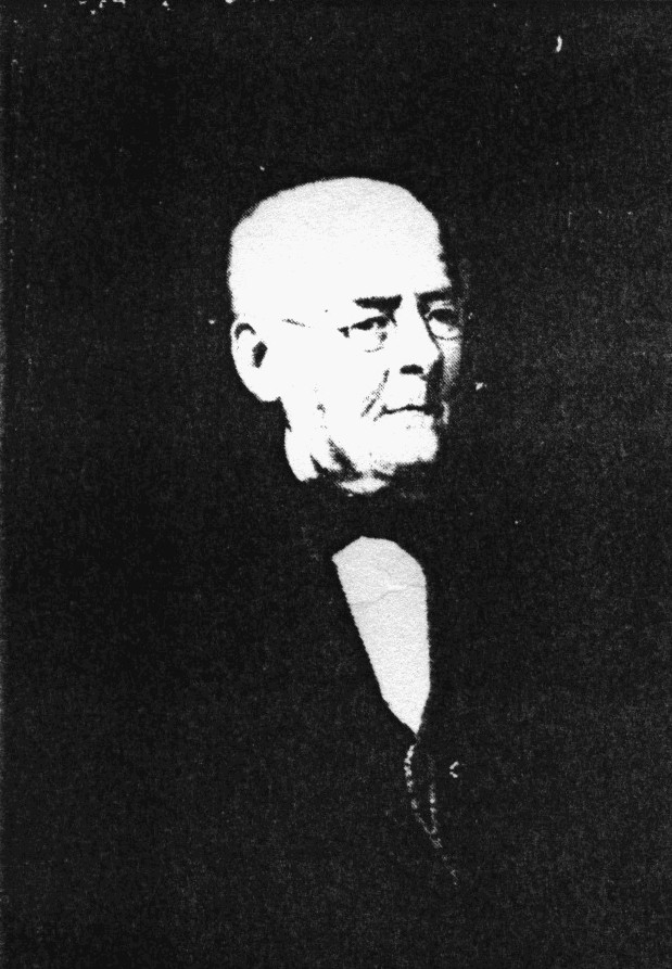 František Škoda (1801 - 1888), Český a rakouský lékař a pedagog.